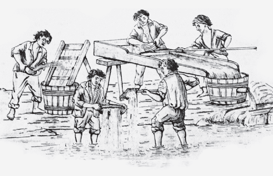 Orpailleurs boyash au travail